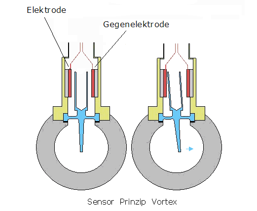 Vortex-Durchflussmesser Sensorprinzip der die Frequenz der Wirbelabrisse aufnimmt. Beispiel: Kapazitive Sensoren, Piezo-Elemente, Dehnmessstreifen, faseroptische und Ultraschallsensoren.